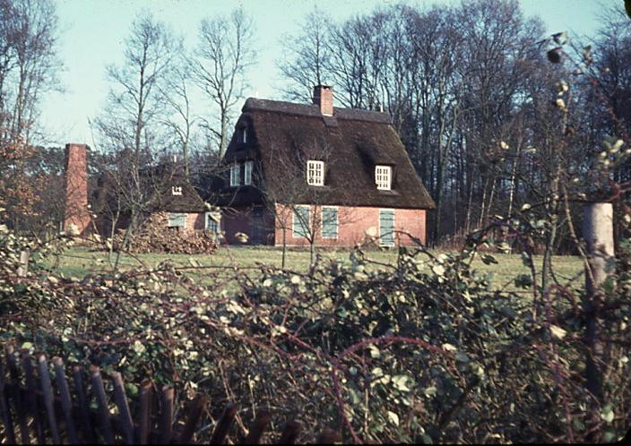 Wochenendhaus in Queckhorn, Niedersachsen, von Julius Schulte-Frohlinde, welches seine konservative Baugesinnung widerspiegelt